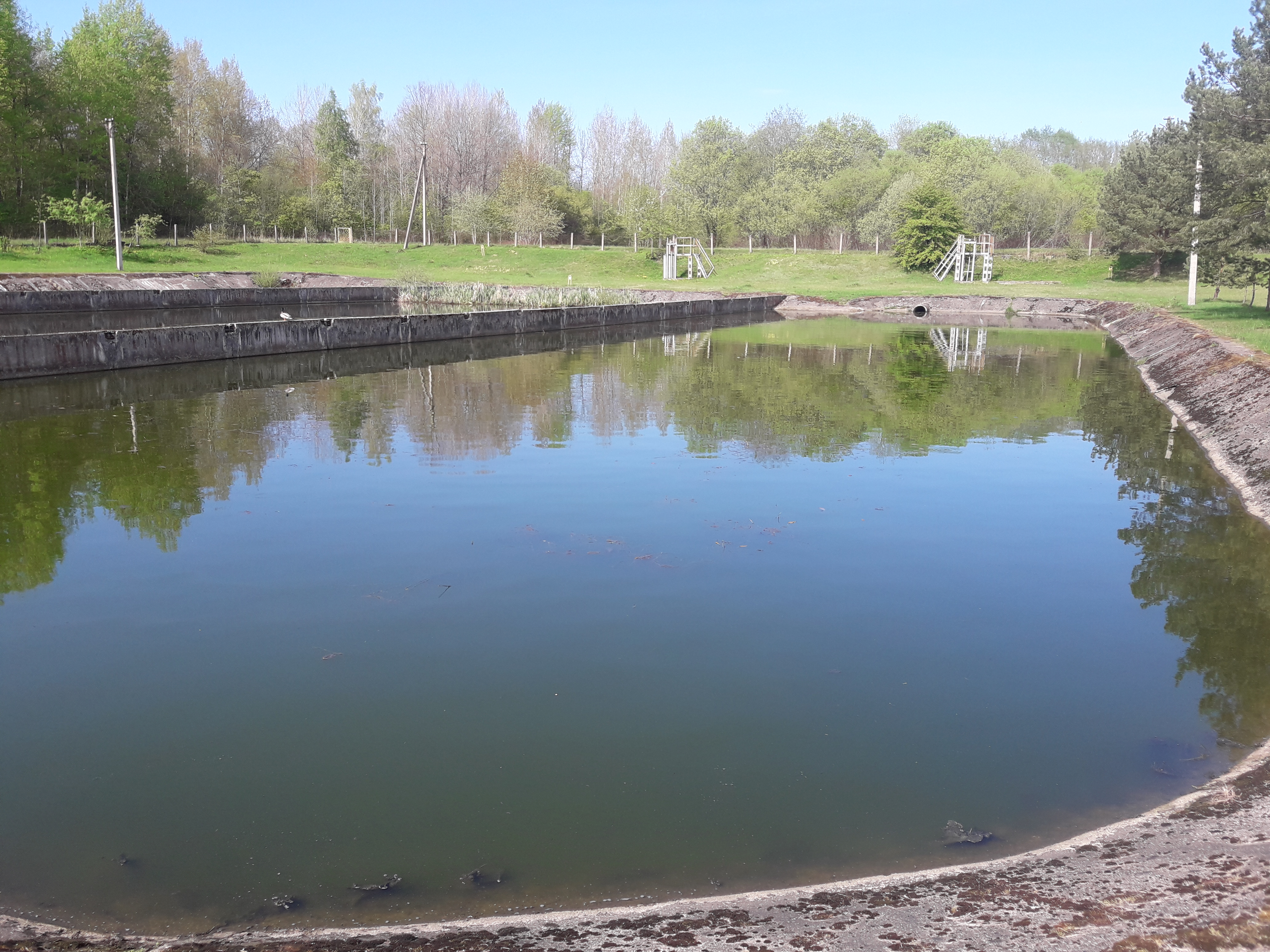 Tvenkinys3